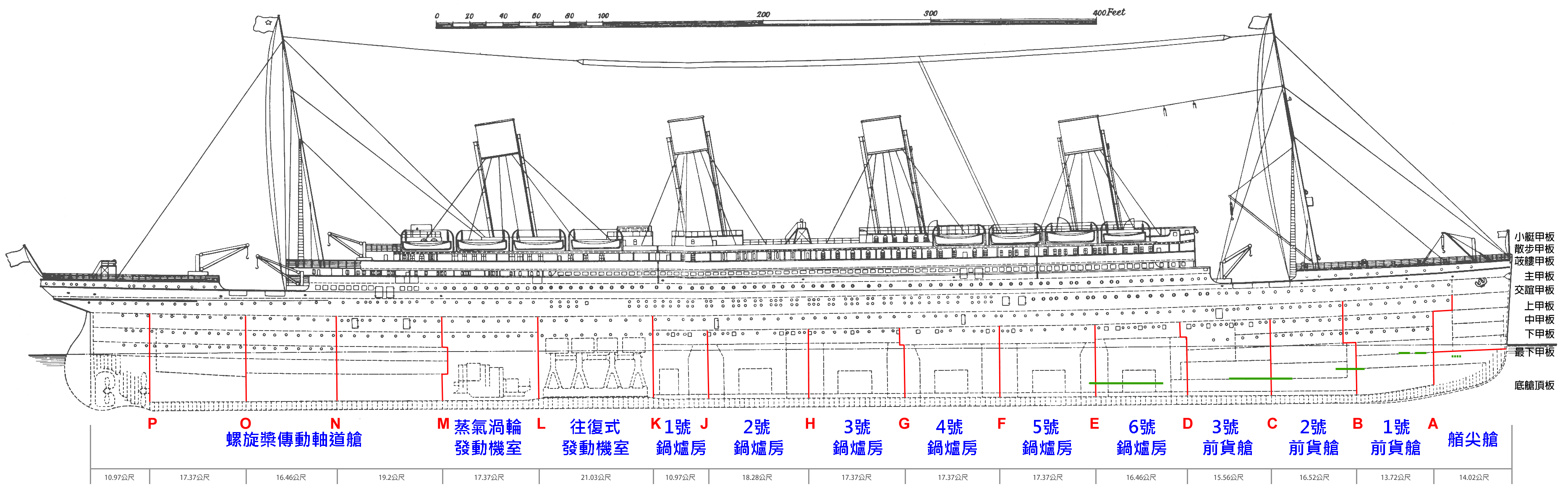 英國皇家郵輪鐵達尼號的側面設計圖（註釋中文版）